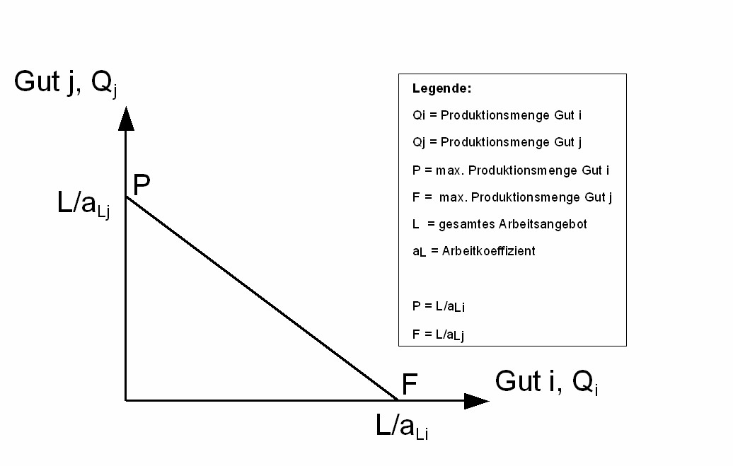 Die Transformationskurve zeigt die Produktions- und damit Konsummöglichkeiten einer autarken Volkswirtschaft